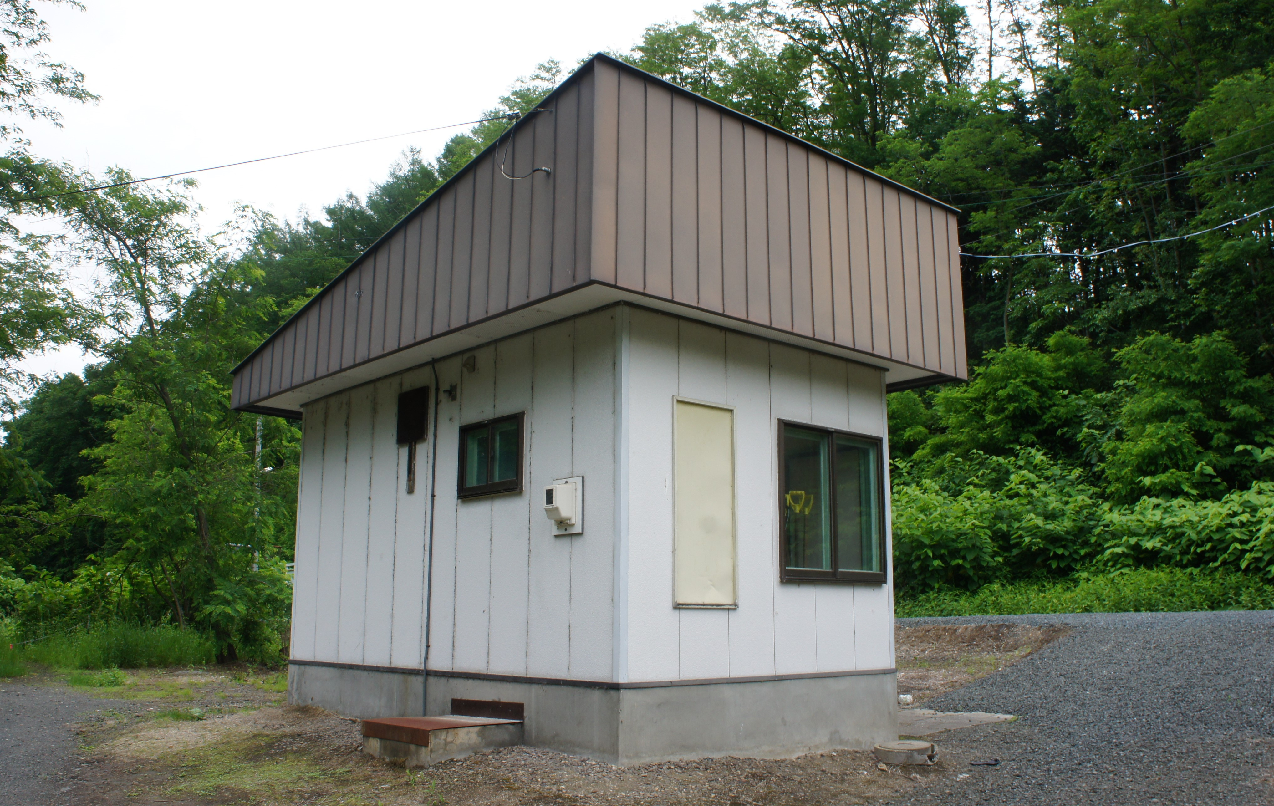 JR石北本線・西女満別駅の駅舎